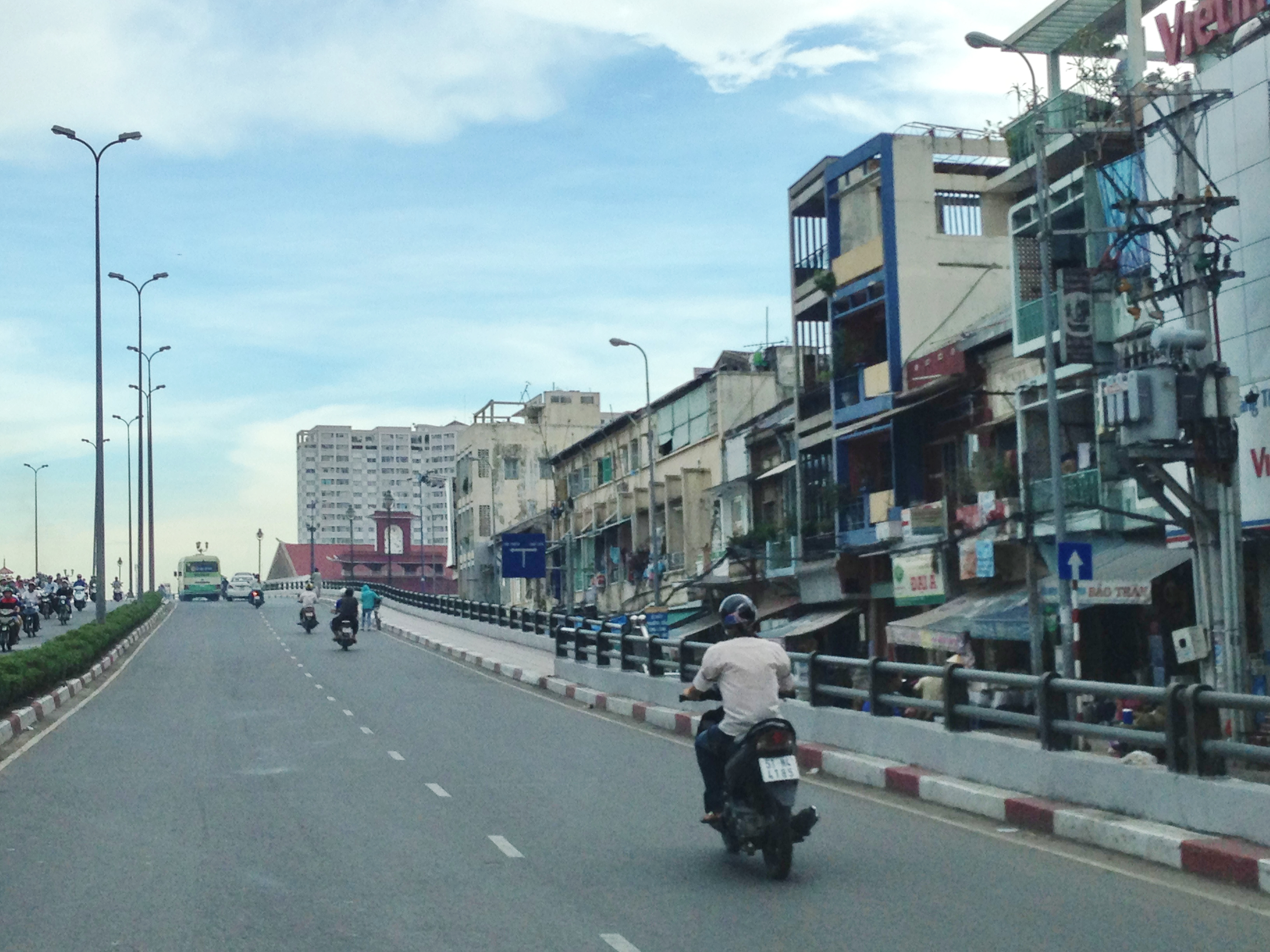 Cầu Ông lãnh, q1 hcmvn